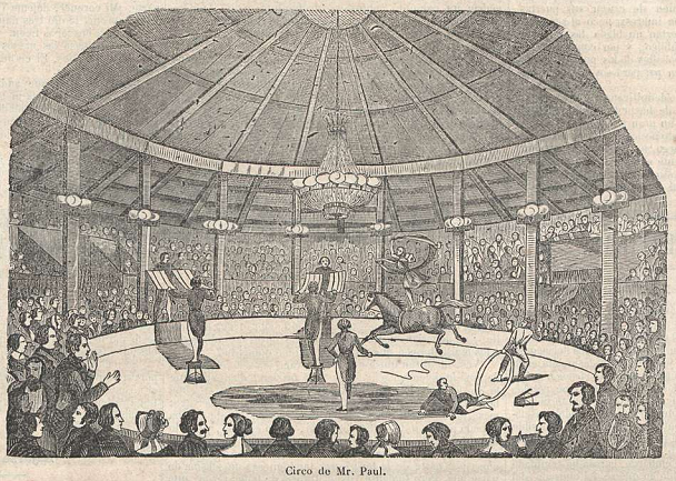 Grabado del Teatro Circo Paul, publicado en la revista española La Ilustración.